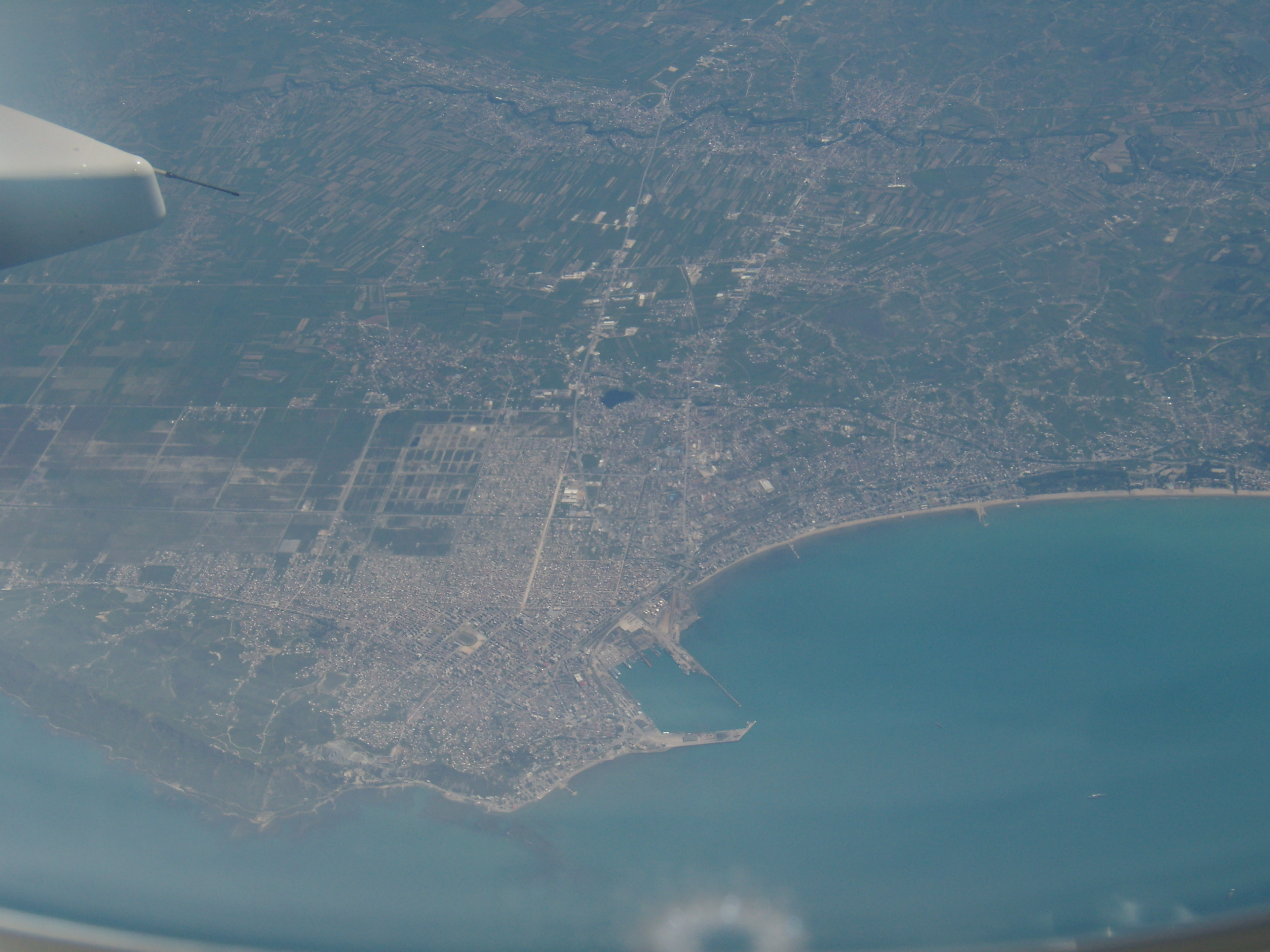 Durrës from air